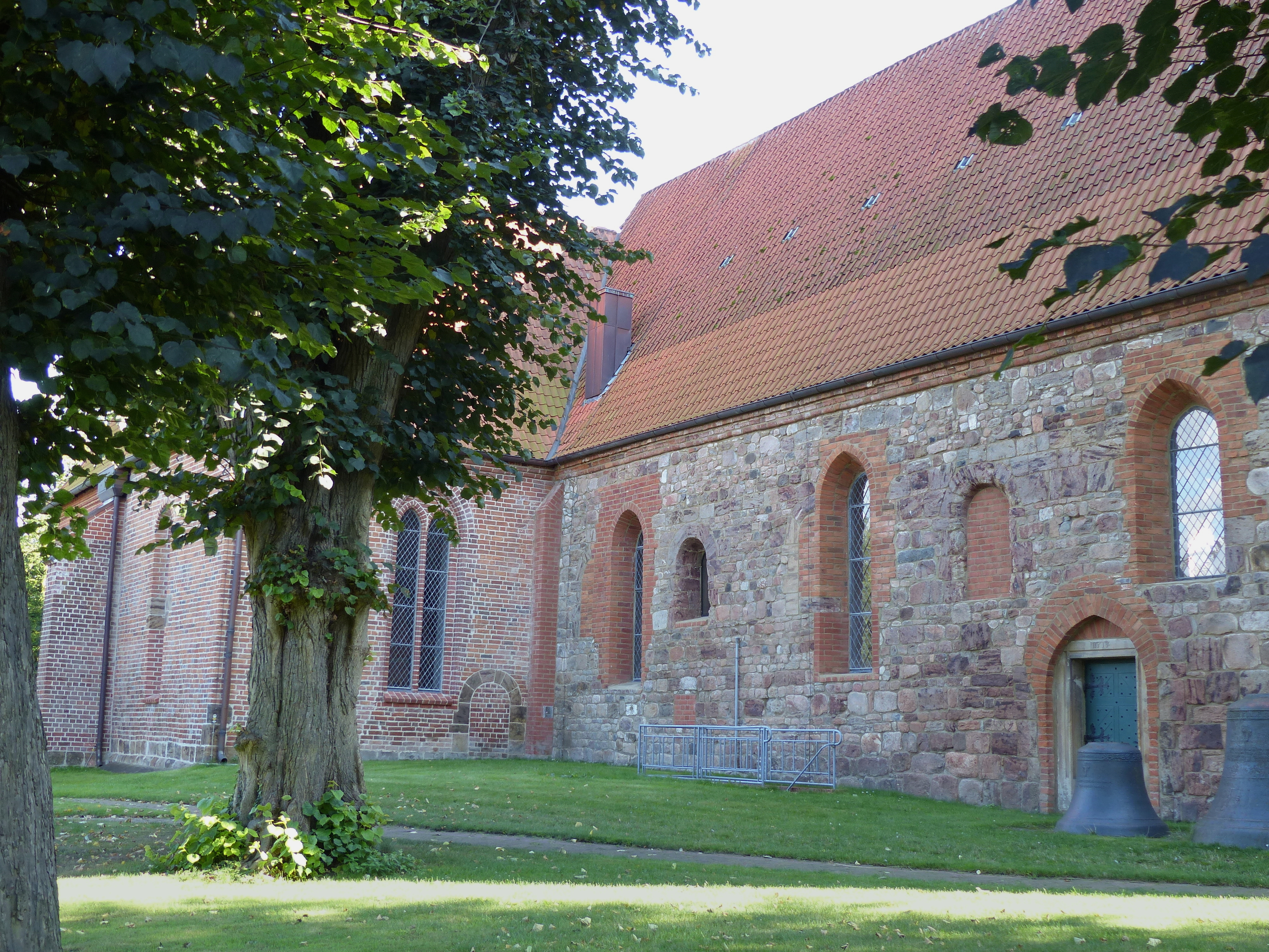 St Cyriakus-Kirche in Vilsen: Langhaus und backsteingotisches Nordquerschiff. Das Gebäude zeigt Spuren mehrer Umbauten: Dem Langhaus, einem romanische Feldsteingemäuer mit Fenster- und Türumrahmungen aus Haustein, wurden gegen Ende des 13. Jahrhunderts Querschiff und Chor im Stil der Backsteingotik angefügt. Fenter und Tore des romanischen Baukörpers wurden gleichzeitig oder später teils vergrößert teils zugemauert. Anscheinend wurde ein romanischer Torbogen in die Westwand des nördlichen Querschiffs umgesetzt. Das in den gotischen Umbau der Langhauswand eingefügte schlichte Sandsteinportal trägt die Jahreszahl 1534 (Am Südquerschiff gibt es ein Portal mit Konsolensturz (DE) und der Jahreszahl 1547). Schließlich fügte Conrad Wilhelm Hase 1880 westlich an die mitelalterlichen Querschiffsarme noch neugotische an, in der Gestaltung stark an den alten orientiert. Von diesem Umbau stammt wohl auch das Fenster in der Westwand des alten Nordquerschiffs. Die verfügbaren Texte im Dehio-Handbuch (DE) und in der Broschüre Mittelalterliche Dorfkirchen in den Landkreisen Diepholz und Nienburg/Weser (2. Aufl. 2013, als PDF) stellen die dem Gebäude abzulesende komplizierte Baugeschichte leider nur unvollständig dar. Als Baudenkmal trägt die Kirche beim Niedersächsischen Landesamt für Denkmalpflege die Nr. 251010.00014